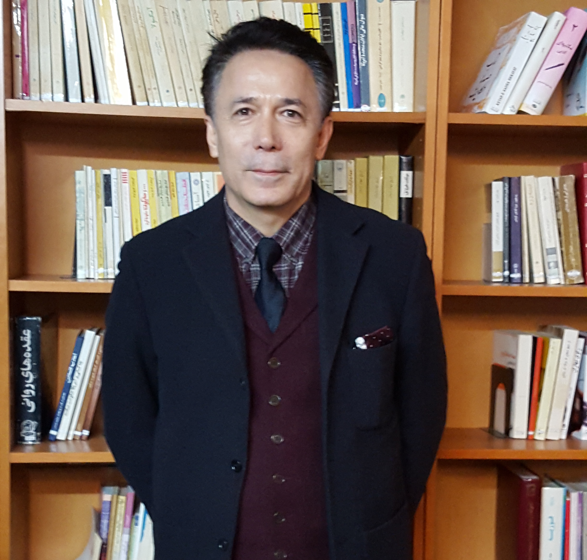 دکتر منشور وارسته